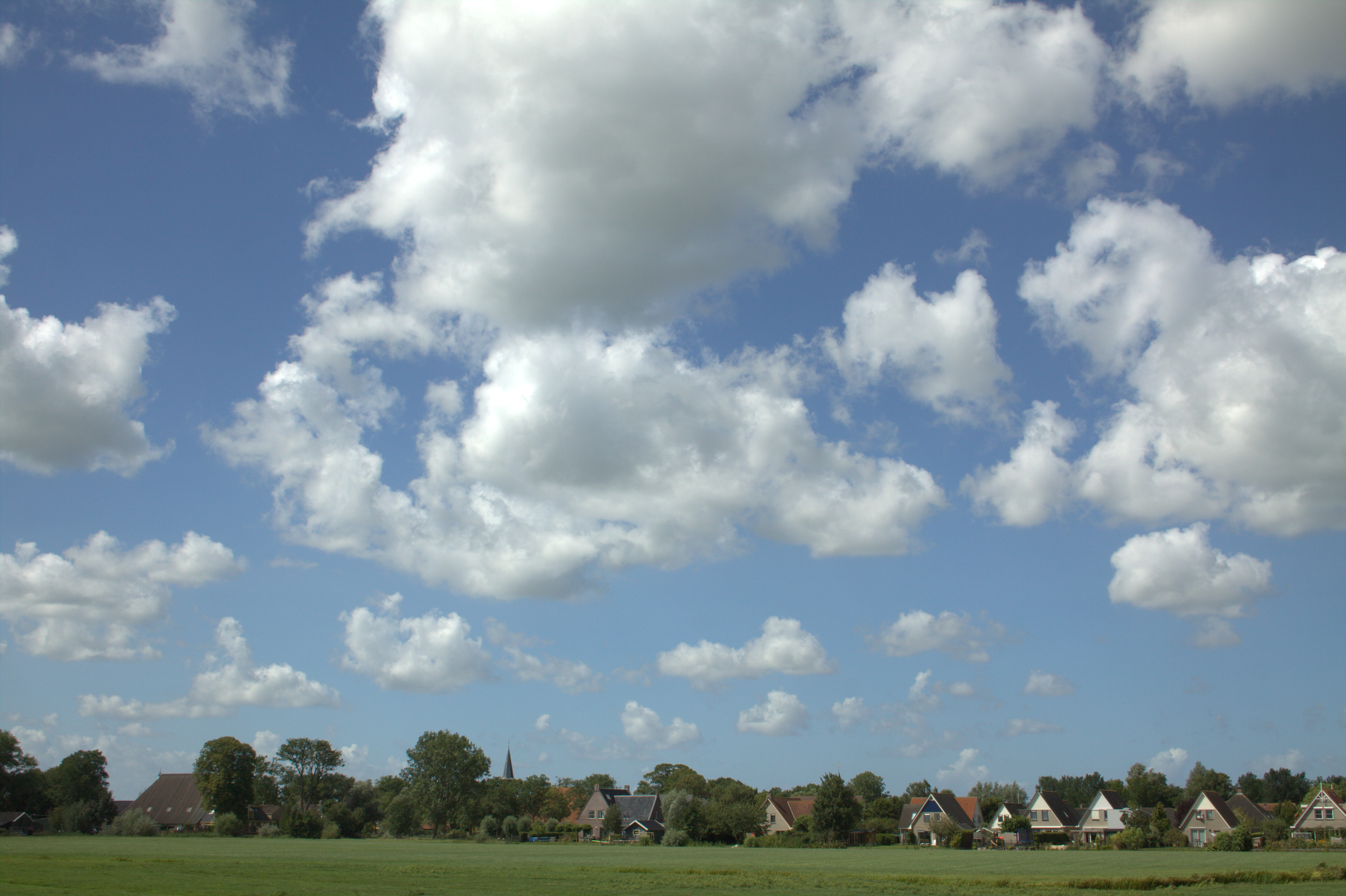 Boksum in het landschap van Friesland niet ver van Leeuwarden in de Gemeente Waadhoeke met ongeveer 400 inwoners.